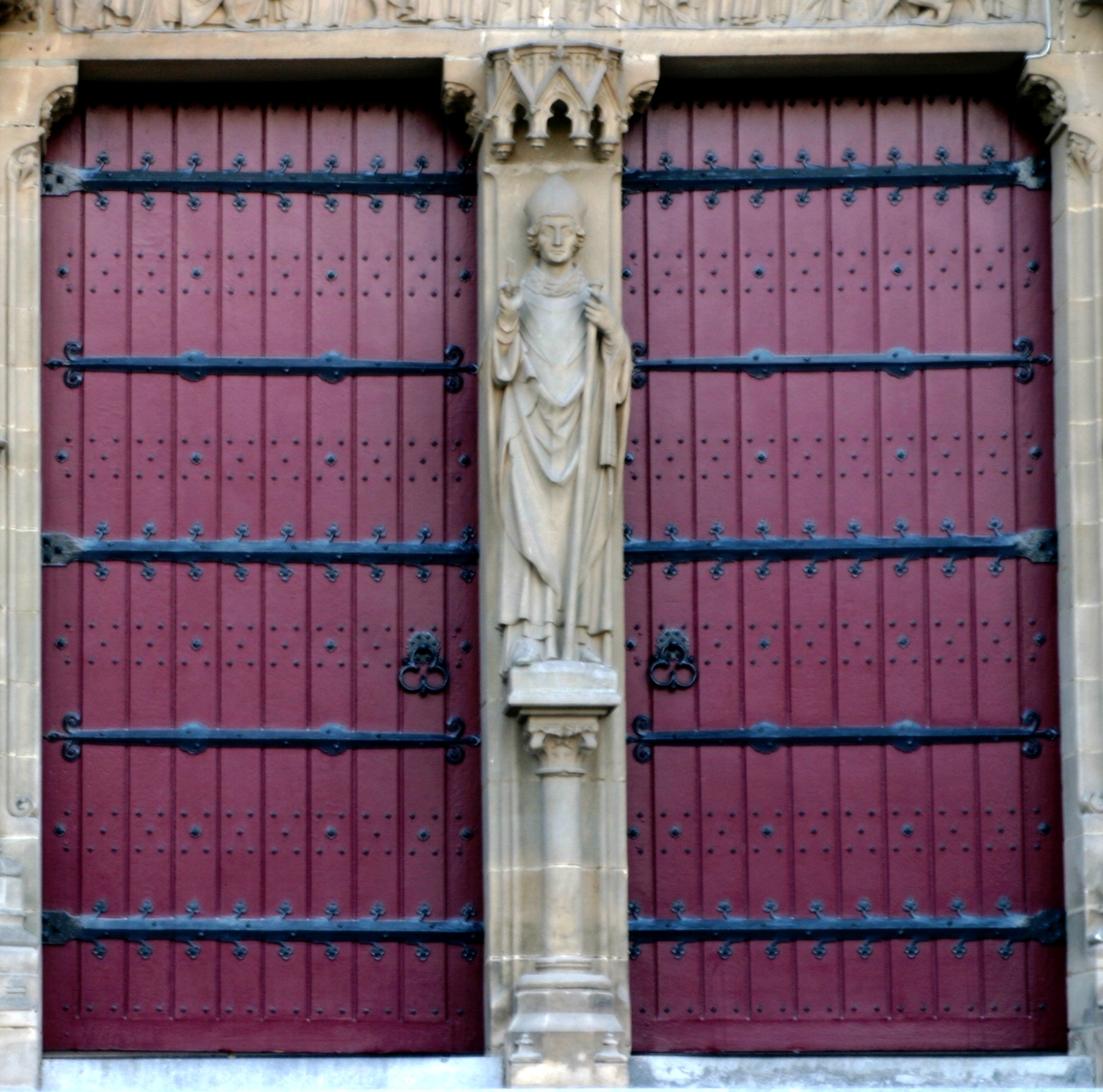 Trumeau am Haaptportal vun der Areler Kierch.